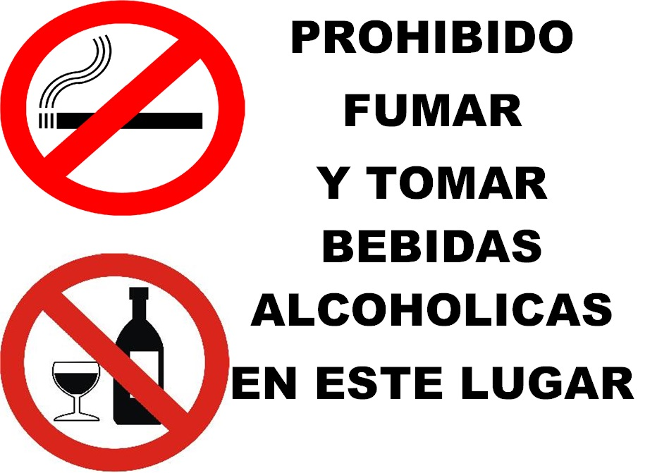 prohibido fumar